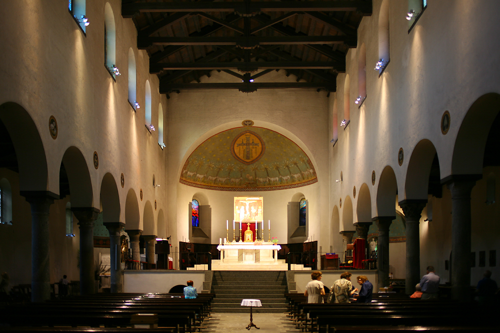 Interno della chiesa di San Vincenzo in Prato, Milano